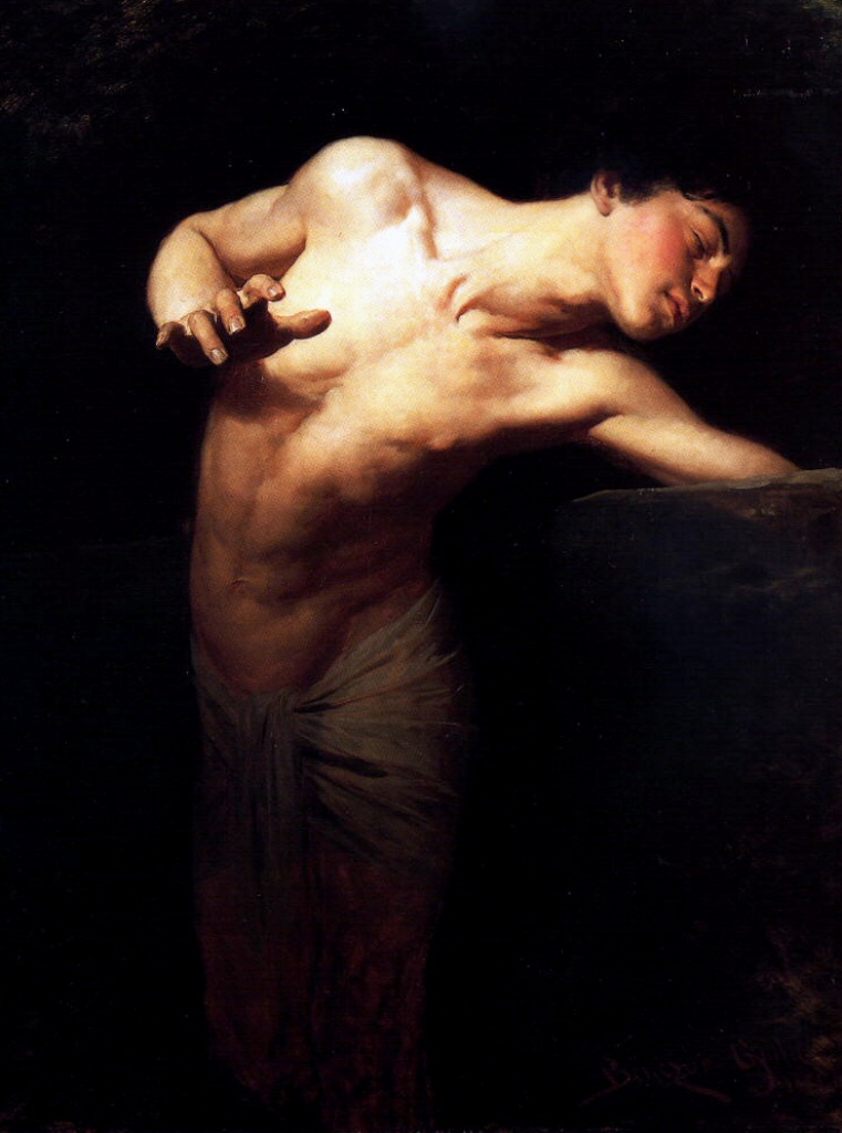 Den Narziss vum Benczúr Gyula (1844-1920) Magyar Nemzeti Galéria, Budapest